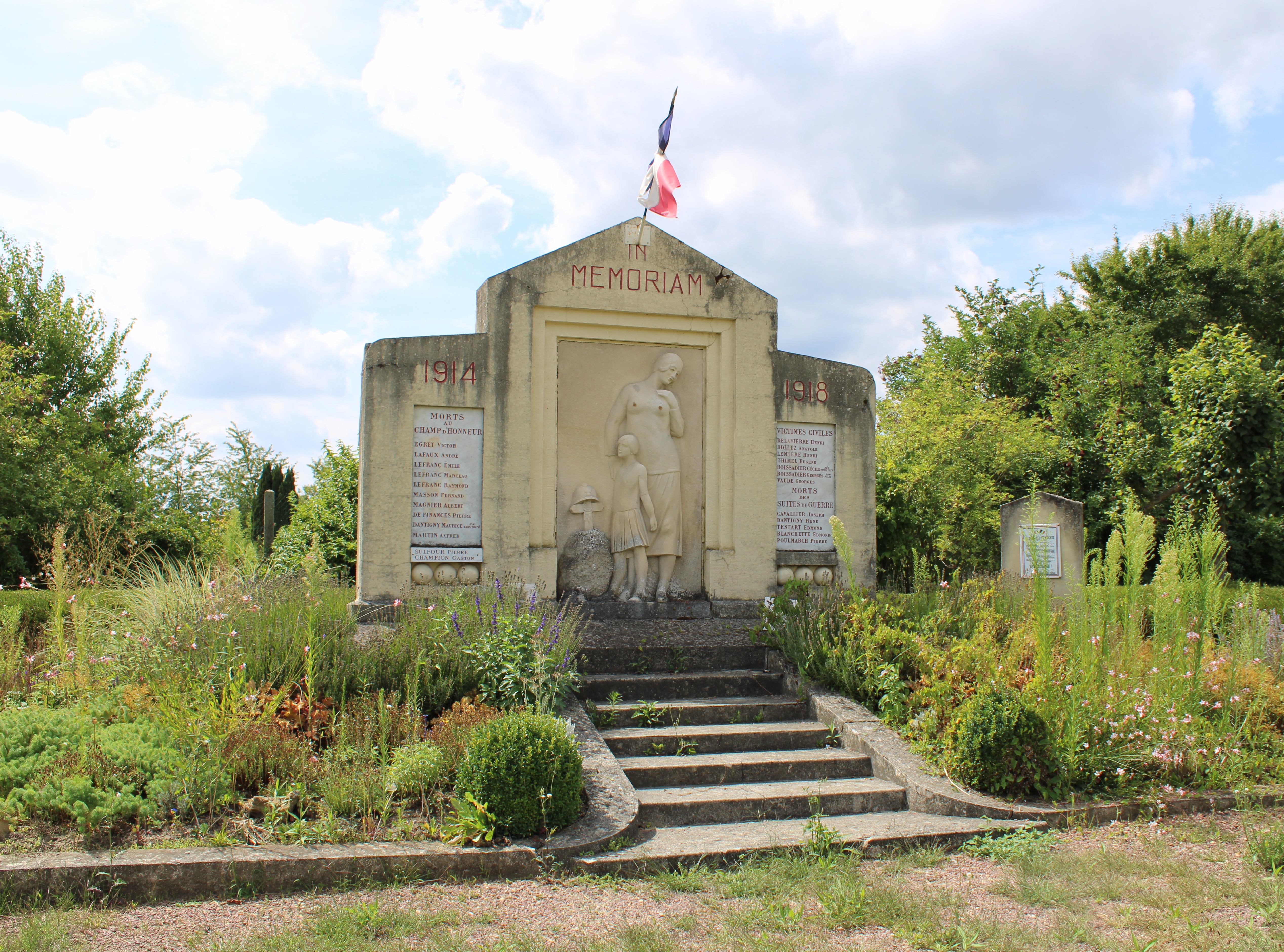 Le monument aux morts